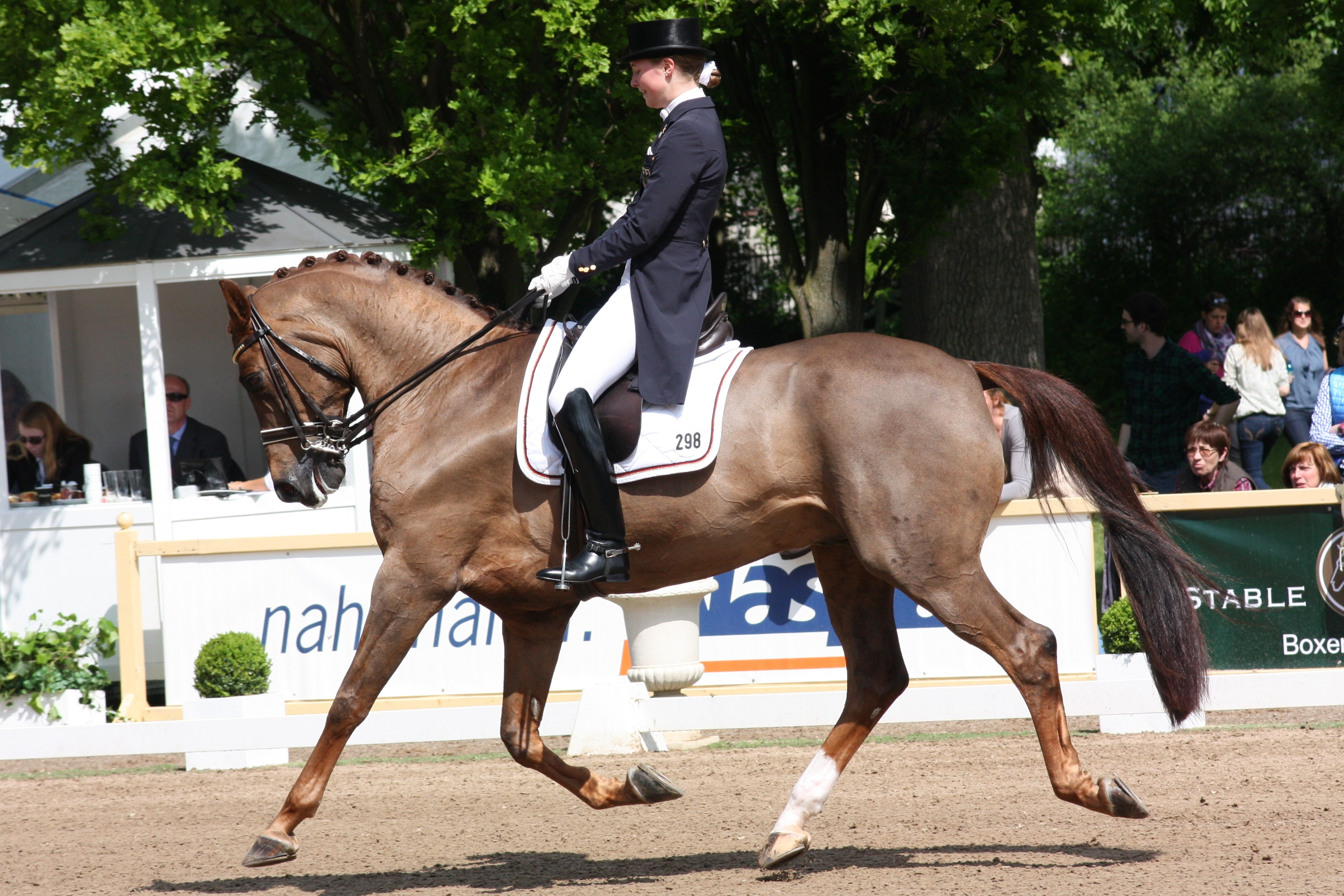 77. Internationales Pfingstturnier Wiesbaden 2013, CDI **** Dressurprüfung Grand Prix de Dressage, Rothenberger, Sanneke mit Favourit Personality rights warning Although this work is freely licensed or in the public domain, the person(s) shown may have rights that legally restrict certain re-uses unless those depicted consent to such uses. In these cases, a model release or other evidence of consent could protect you from infringement claims.